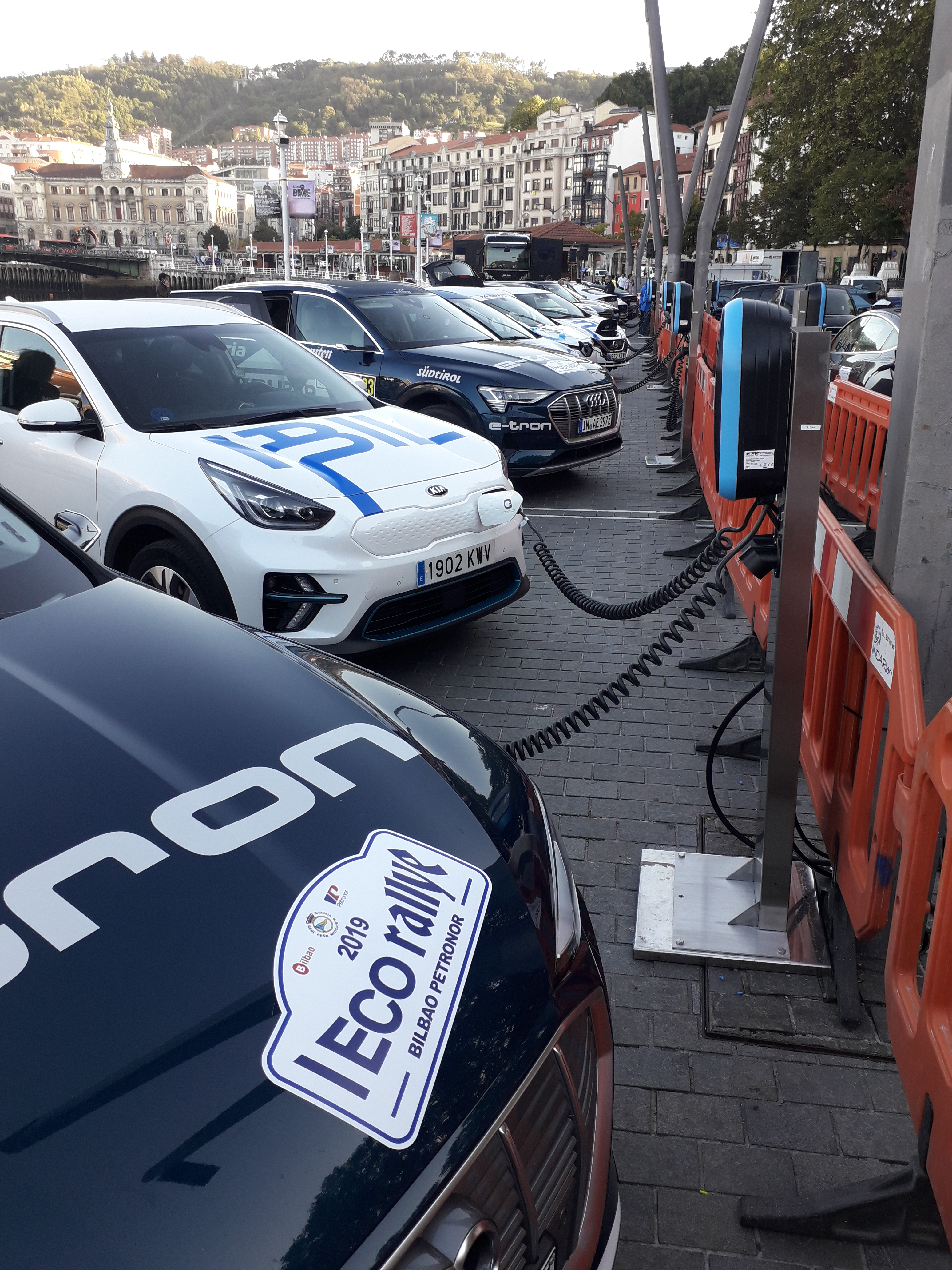 Le auto dell'Eco Rallye Bilbao 2019 in ricarica al Paseo del Arenal